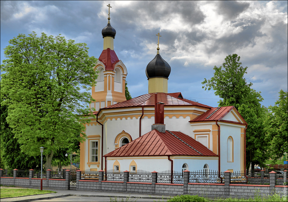 Ваўкавыск. Царква